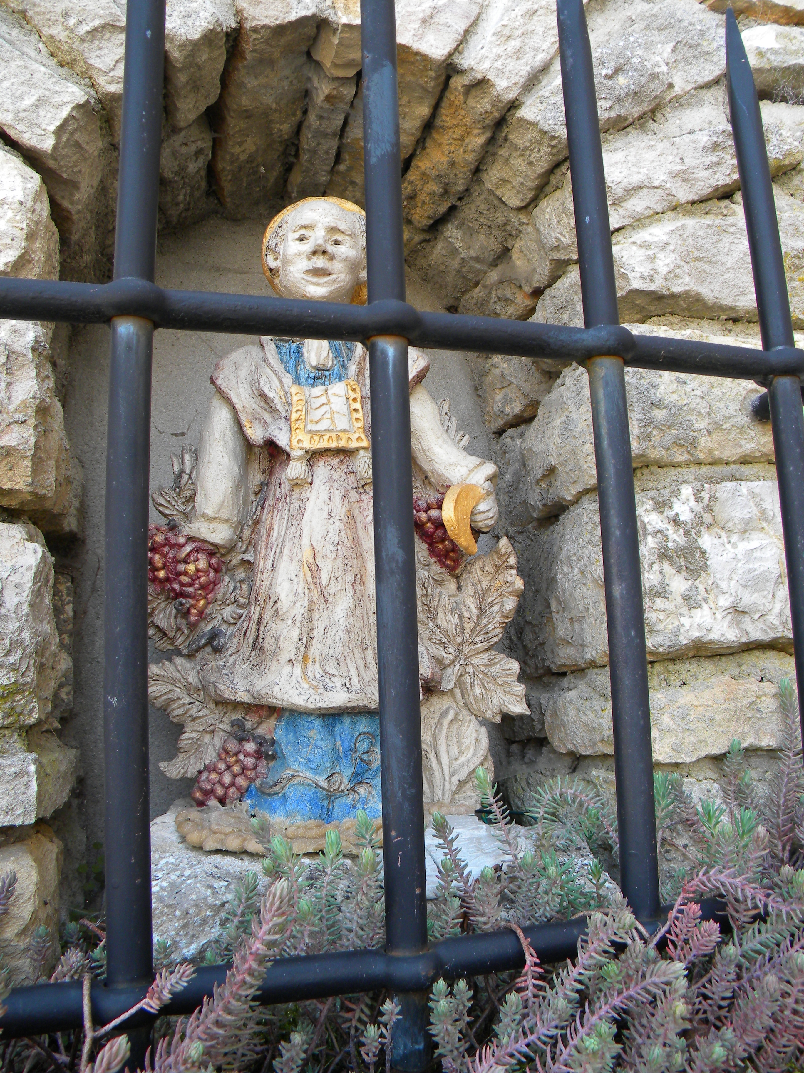 Statuo